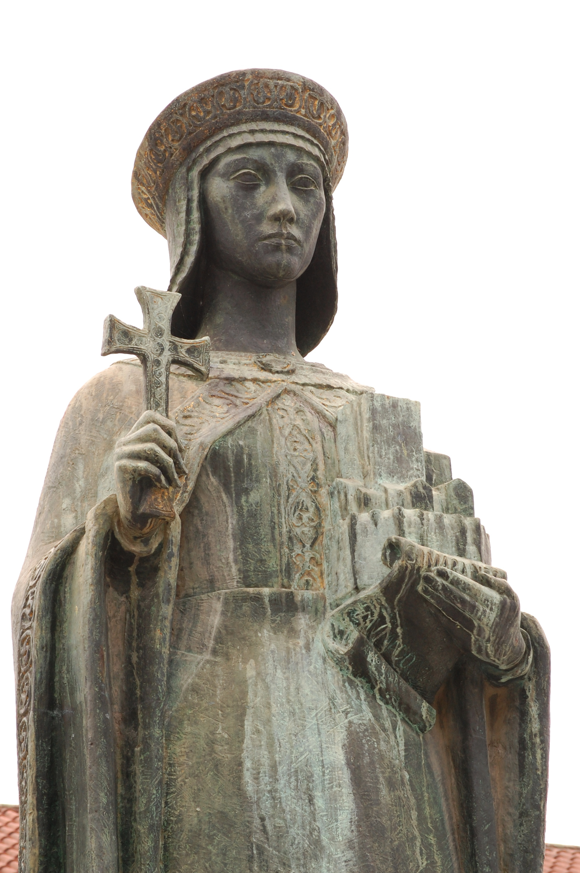 Estátua de Mumadona Dias, na praça homónima.